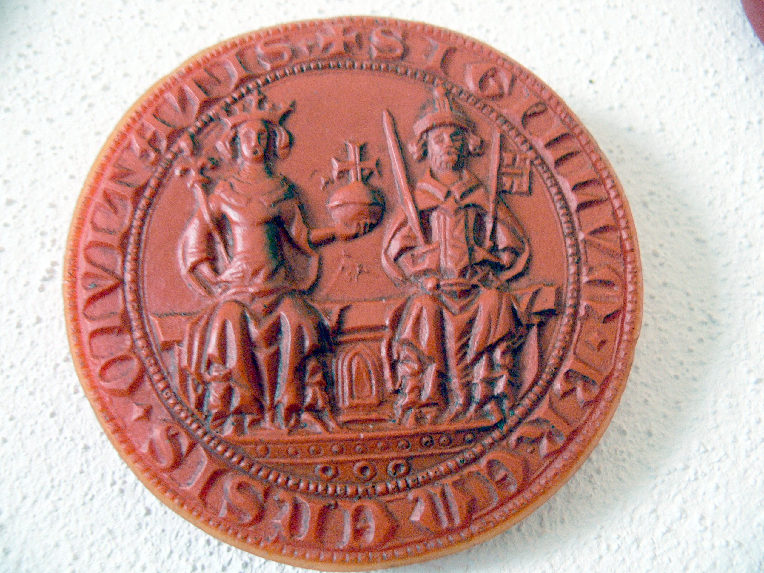 Stadtsiegel von Bremen 1366. Umschrift: „Sigillum Bremensis Civitatis“.